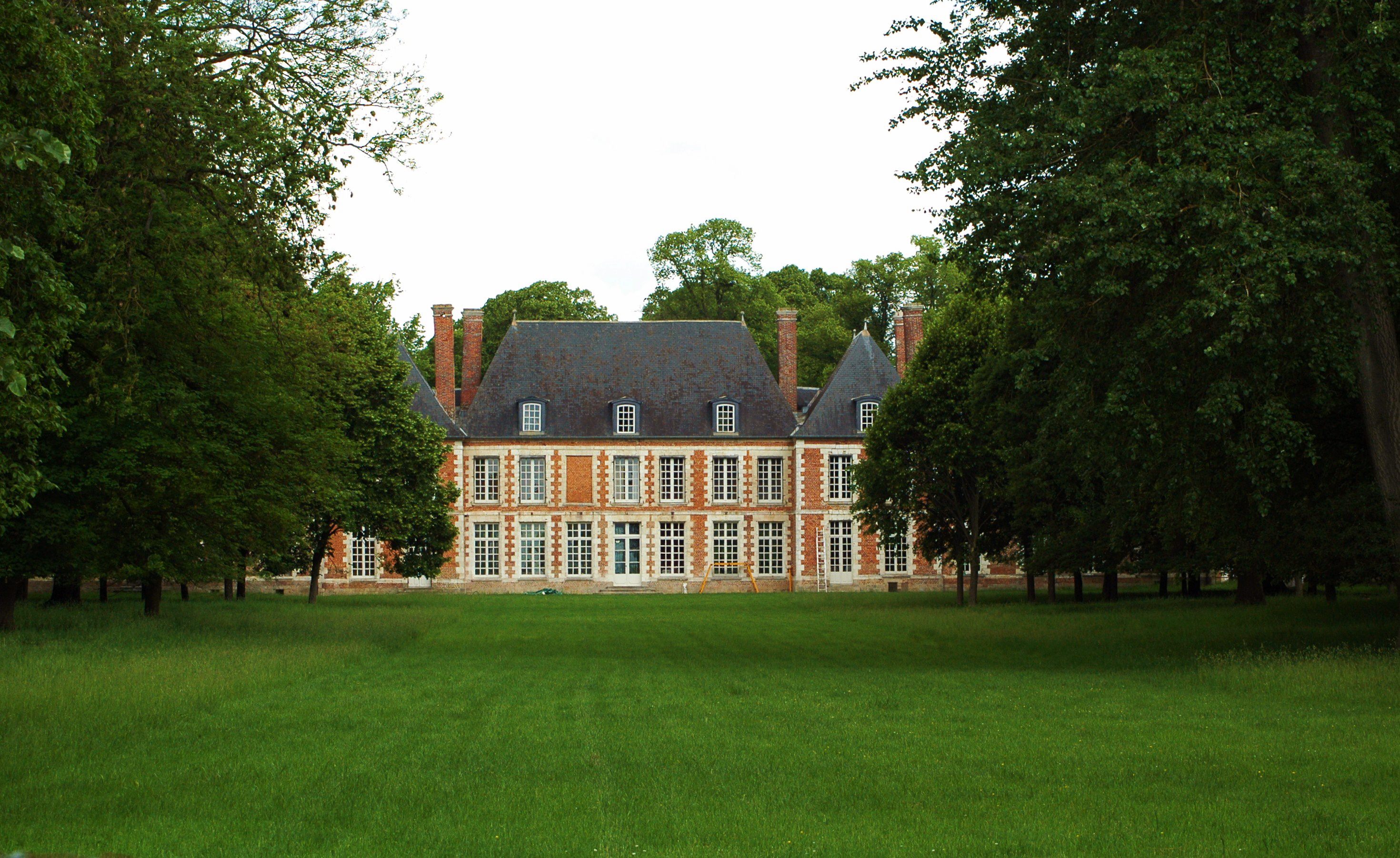 Ribeaucourt (Somme, France). Le château.